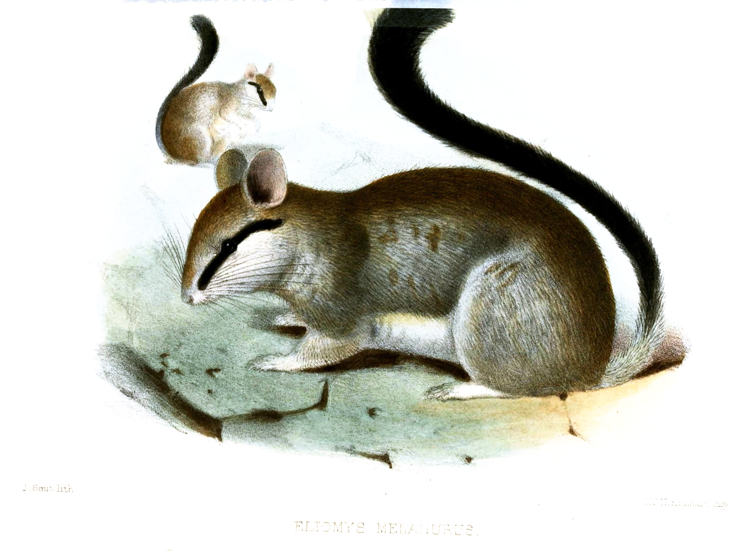 Eliomys melanurus